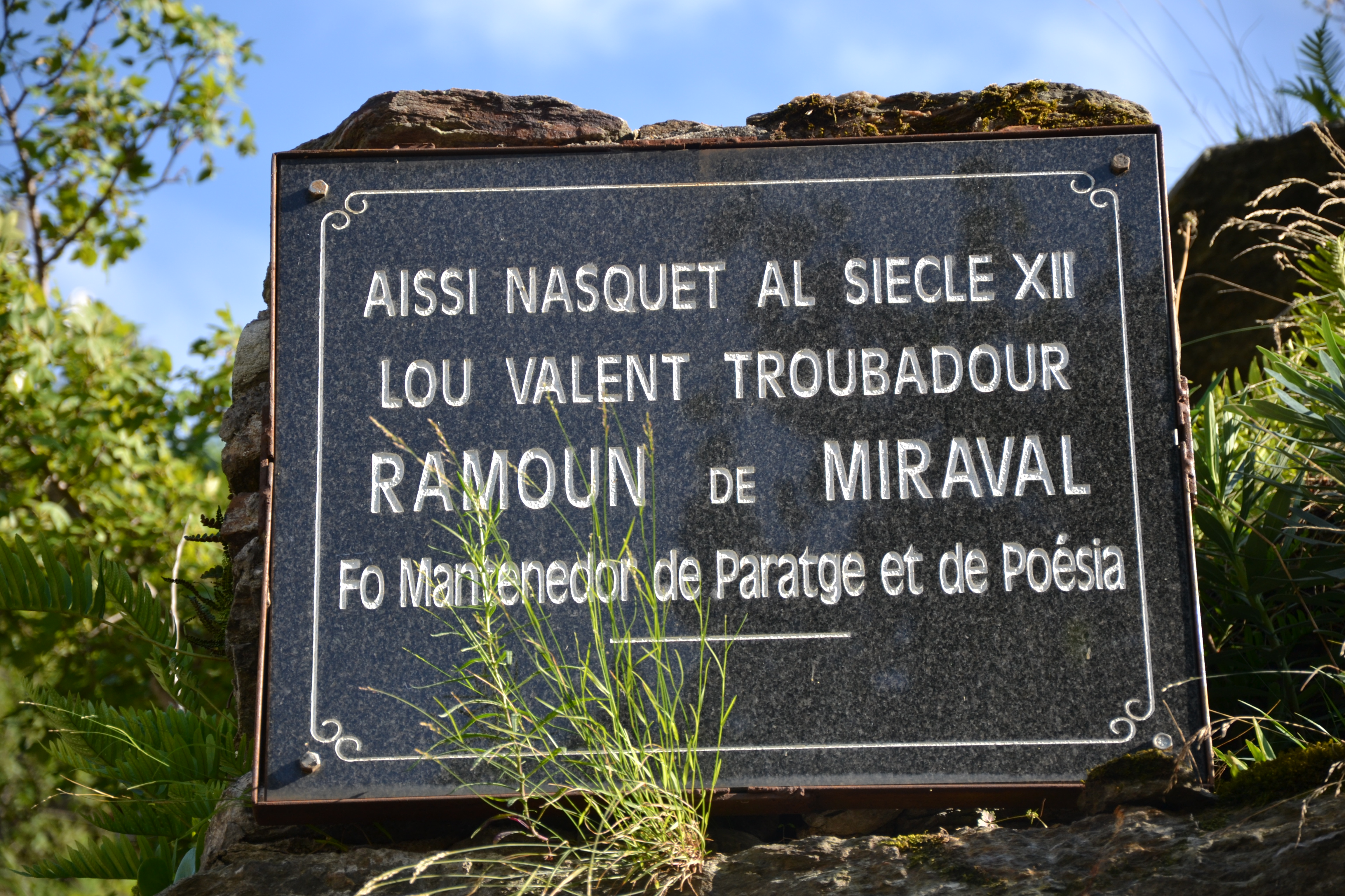 Plaque à la mémoire du troubadour Raimon originaire de Miraval